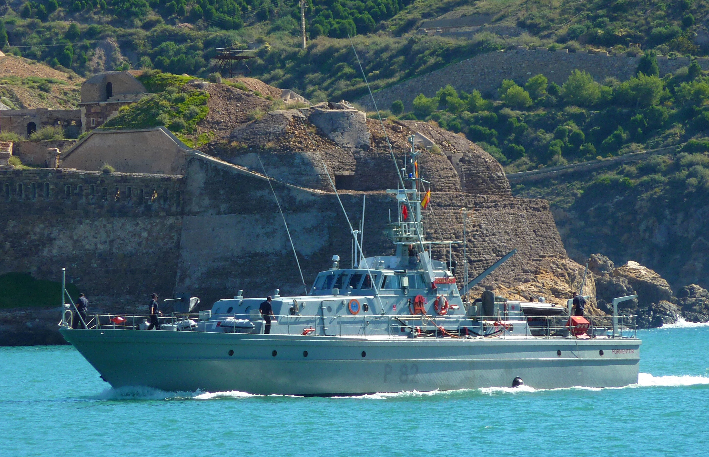 Patrullero clase Toralla "Formentor" de la Armada Española.